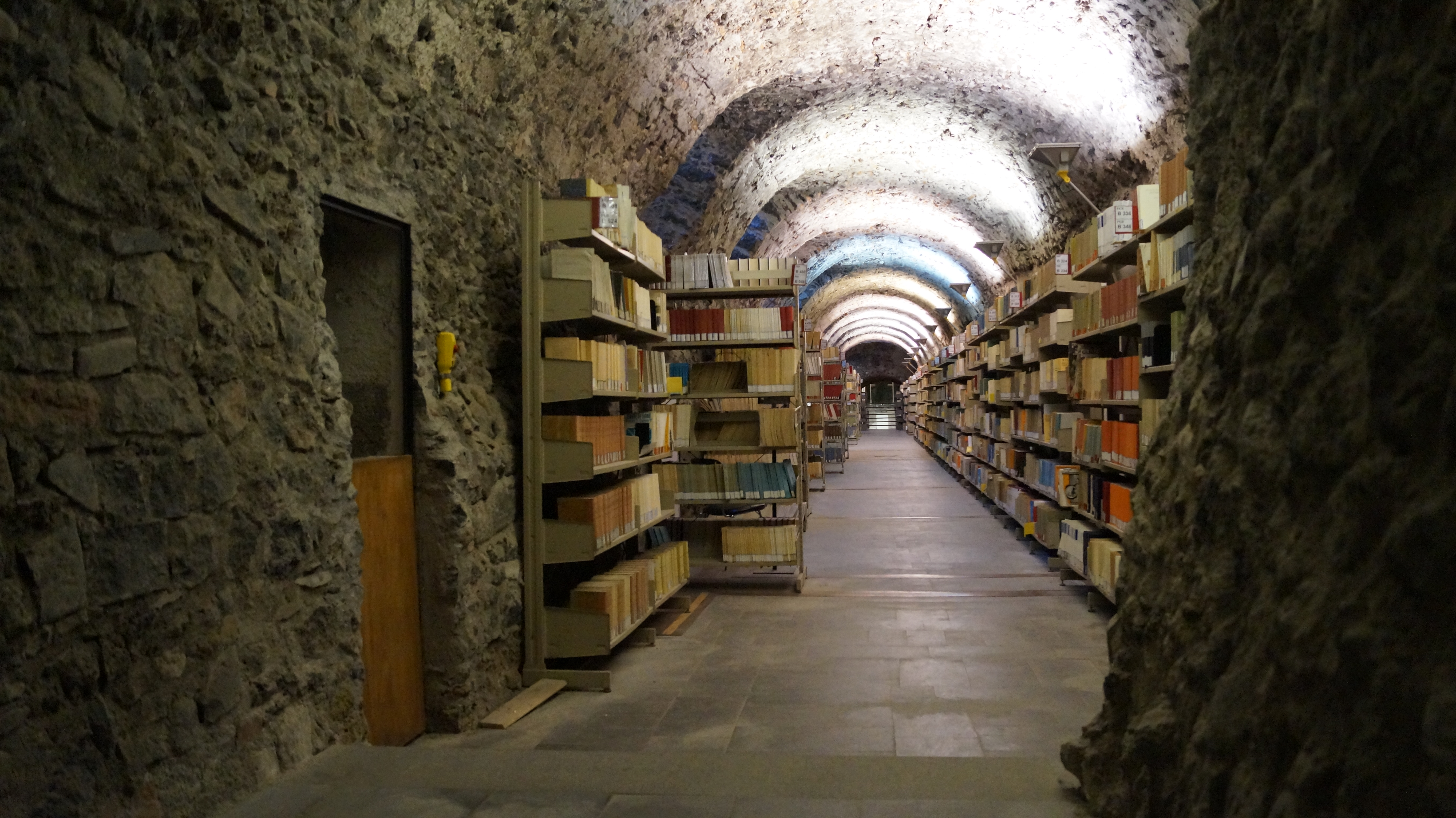 Biblioteca del DISUM dell'Università degli studi di Catania